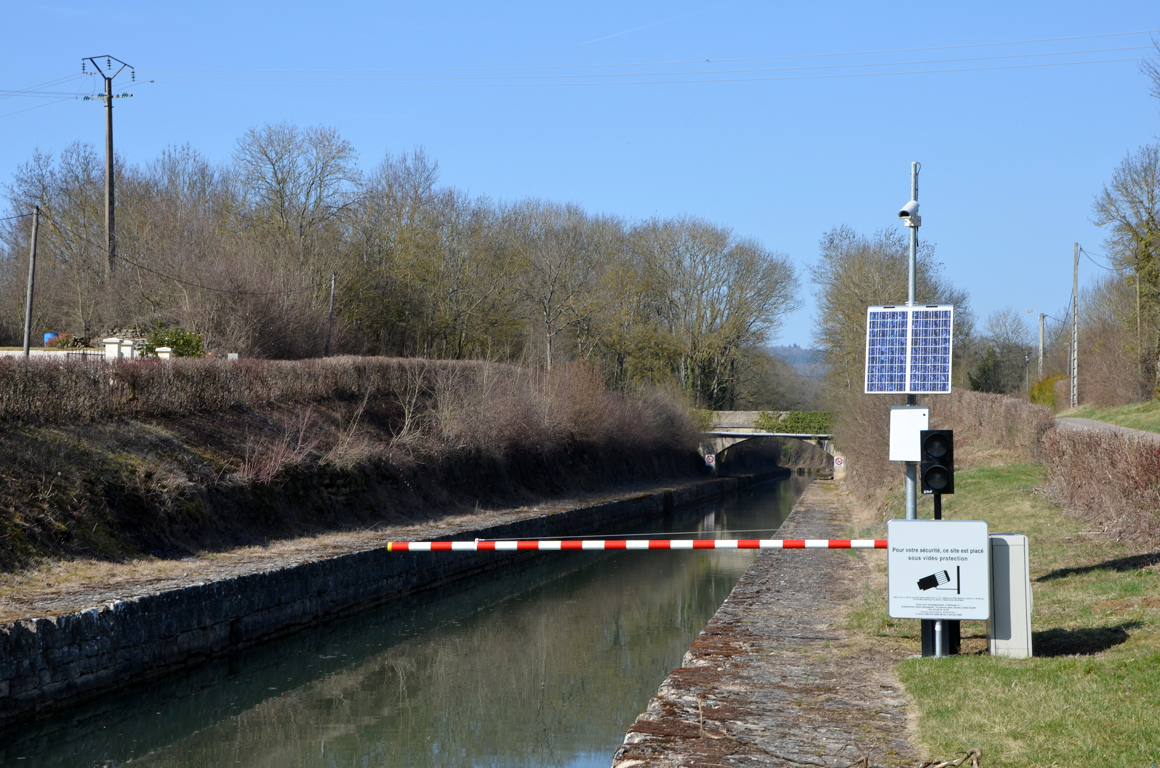 Côte-d'Or, pays d'Auxois, Bourgogne, France. Sur Créancey : à la sortie du port d'Escommes (juste derrière nous, sur Maconge), la "tranchée de Créancey" en direction du tunnel du canal de Bourgogne (qui s'ouvre sur Créancey et finit à Pouilly-en-Auxois). En face, le pont de la Lochère, vu du sud.